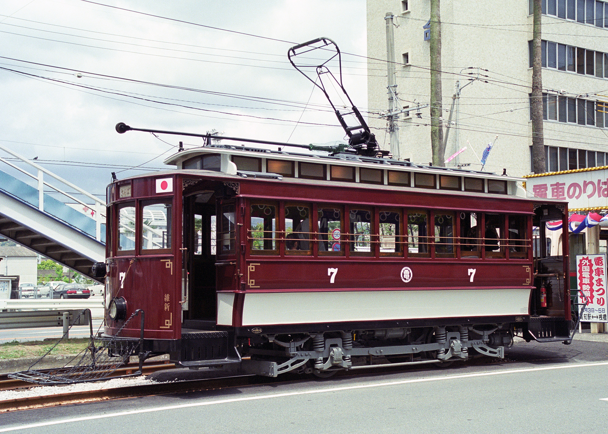 土佐電気鉄道 7形 維新号 ＠ 高知駅前。